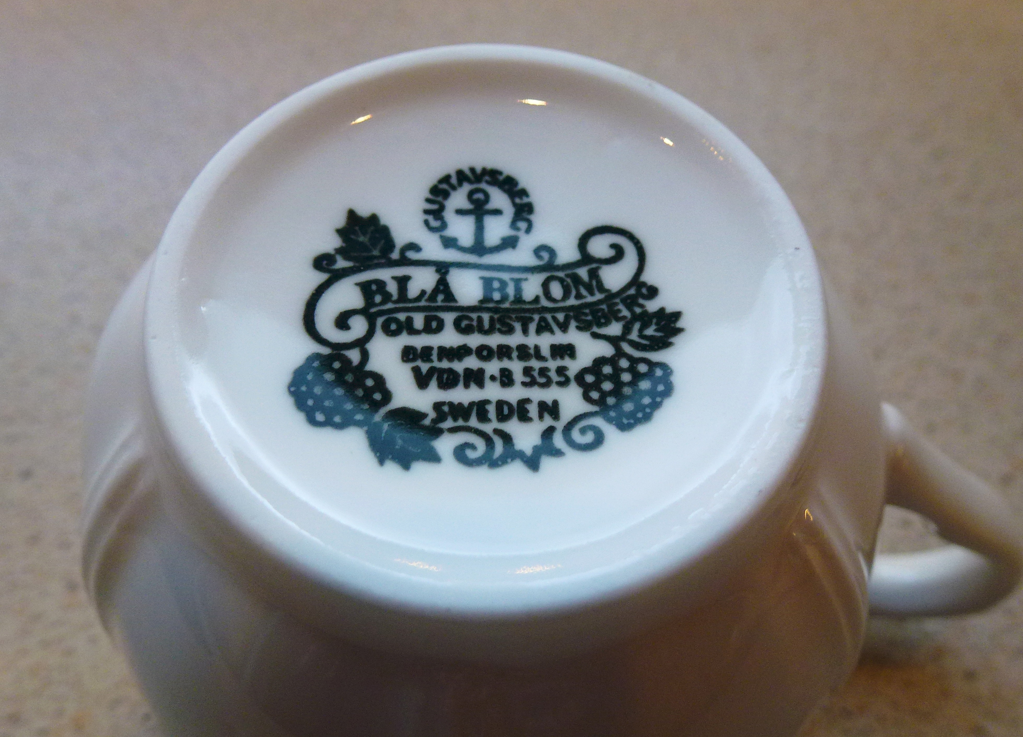 Blå Blom stämpel